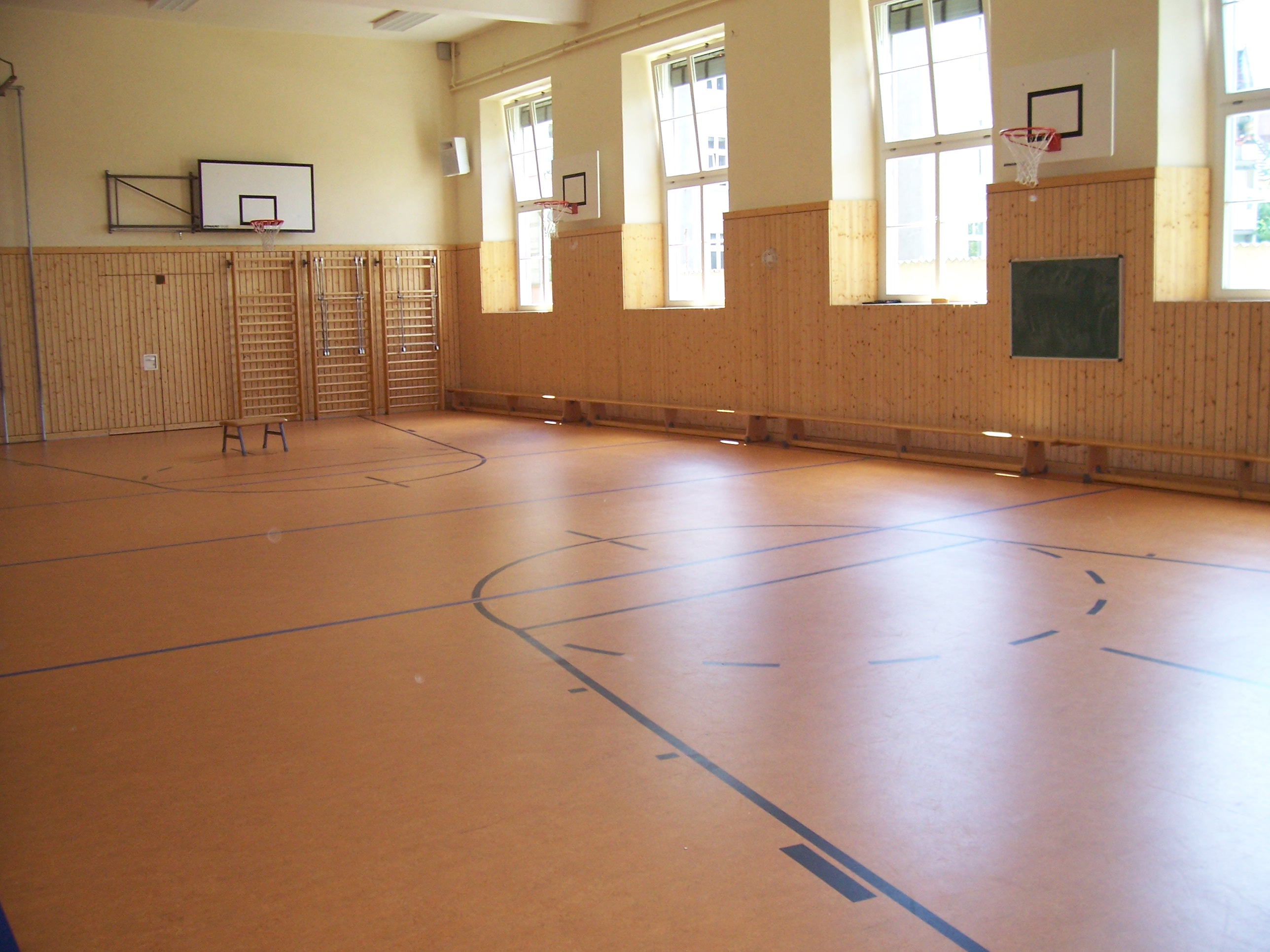 Turnhalle des Goethegebäudes